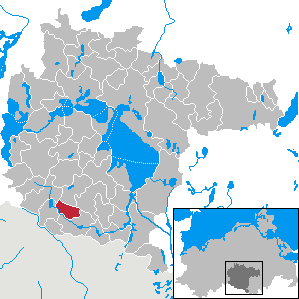 Zepkow im Landkreis Müritz, Mecklenburg-Vorpommern